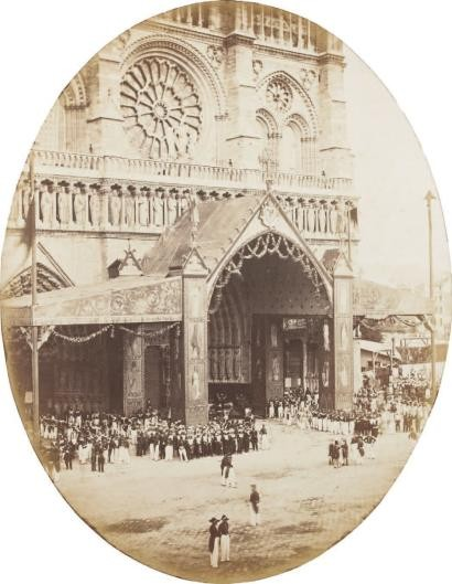 Baptême du Prince Impérial à Notre-Dame de Paris, 1856, Tirage sur papier salé d'après négatif verre au collodion, 295 x 228 mm, support 472 x 367 mm Signé à l'encre Martens et V. Plumier, timbre sec Martens Paris.